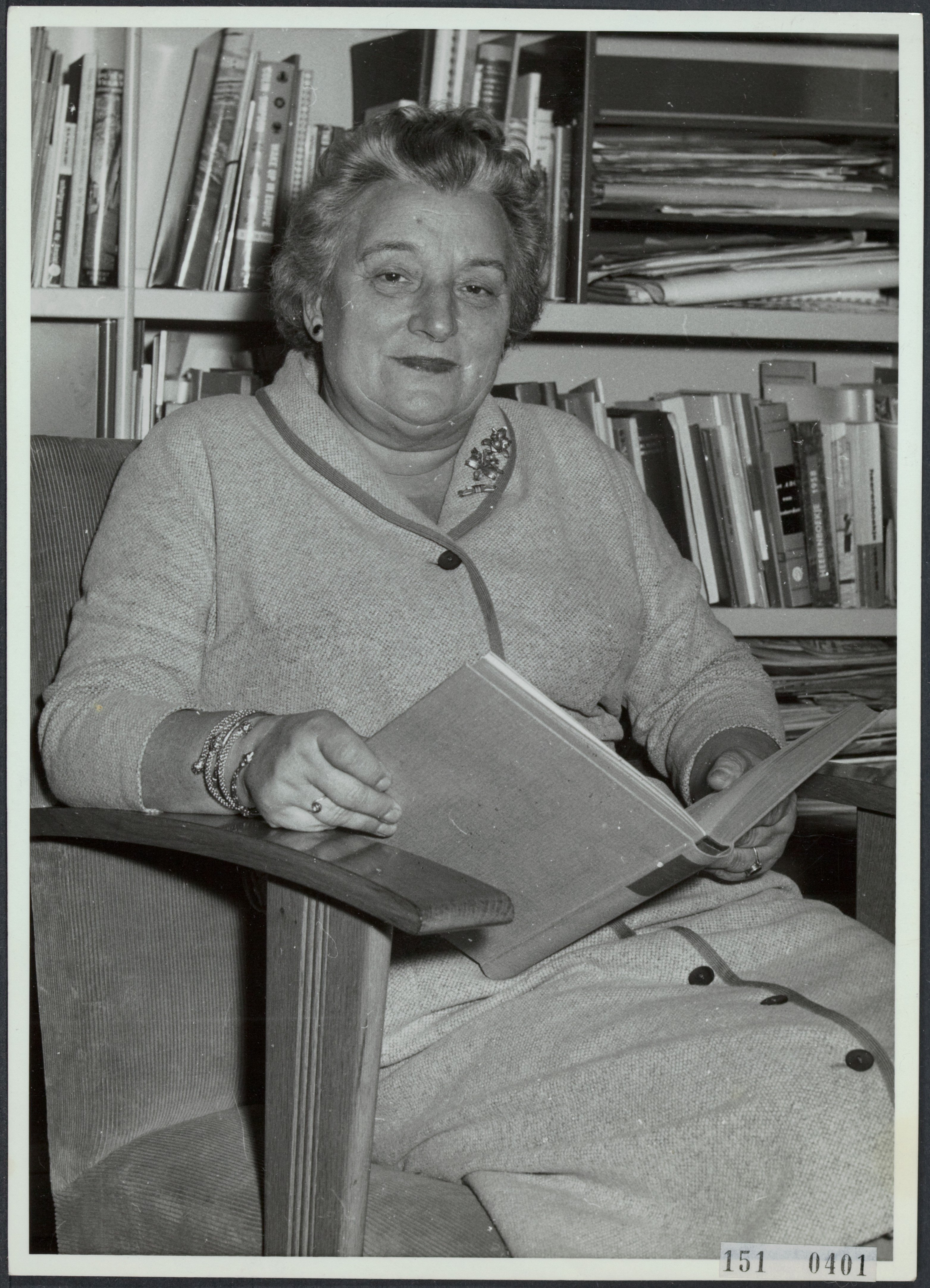 Truus Wijsmuller-Meijer, gemeenteraadslid Gemeente Amsterdam. Wellicht bij afscheid als gemeenteraadslid in 1966?